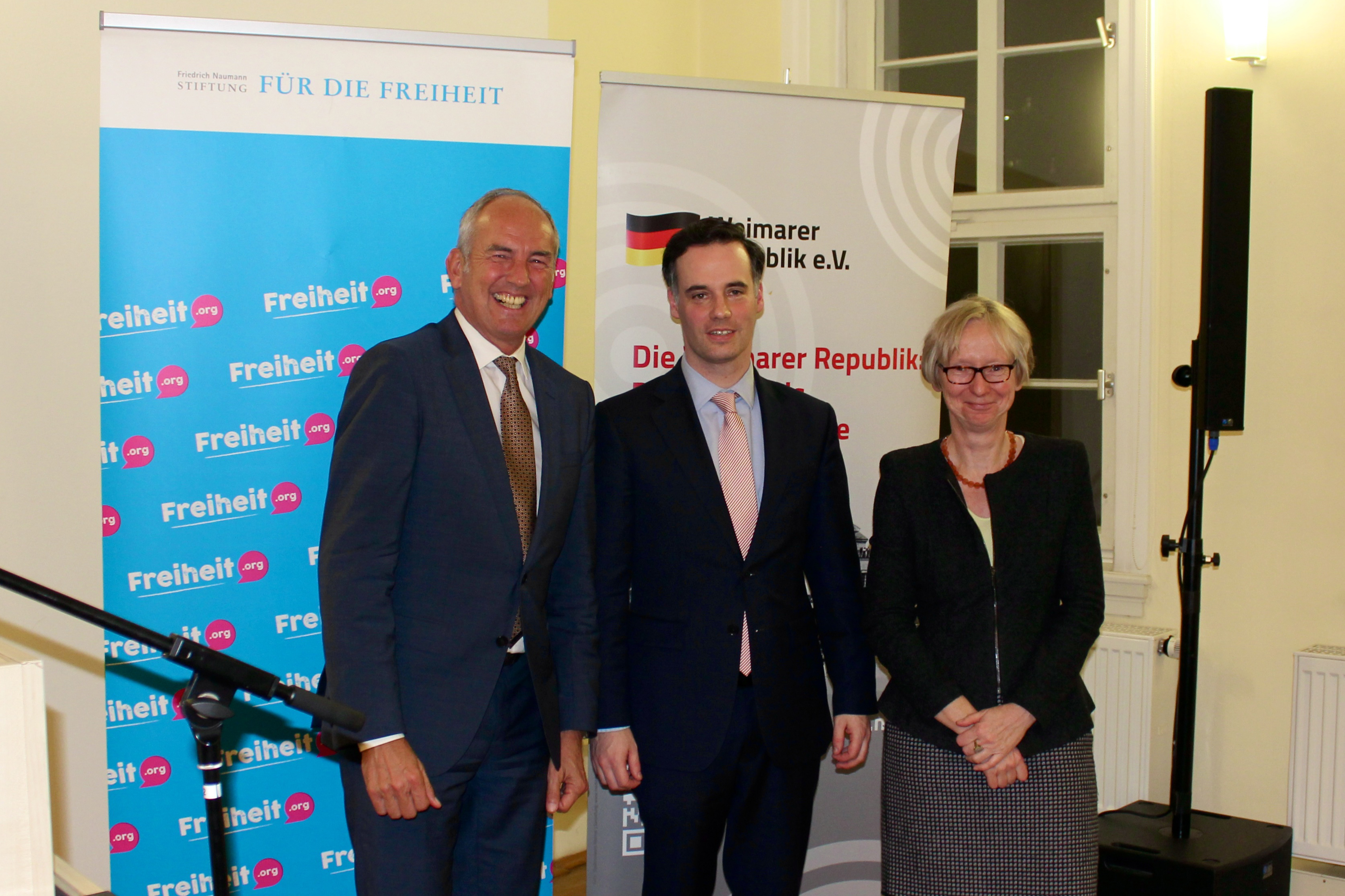 Wolf-Erich-Kellner-Preis-Verleihung 2018. Matthias Oppermann, Laudatorin Anne Christine Nagel (rechts), Kuratoriumsvorsitzender Joachim Scholtyseck (links im Bild)